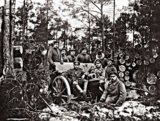 Jääkäripataljoona 27:n haupitsijaoksen toinen tykki tuliasemassa miehistöineen Riianlahdella syksyllä 1916.